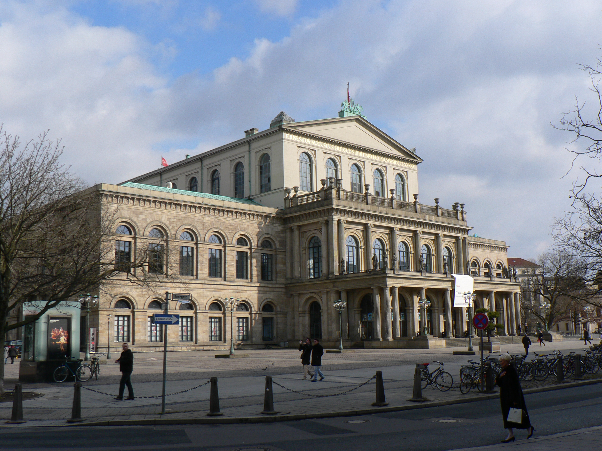 Hannoveraner Opernhaus